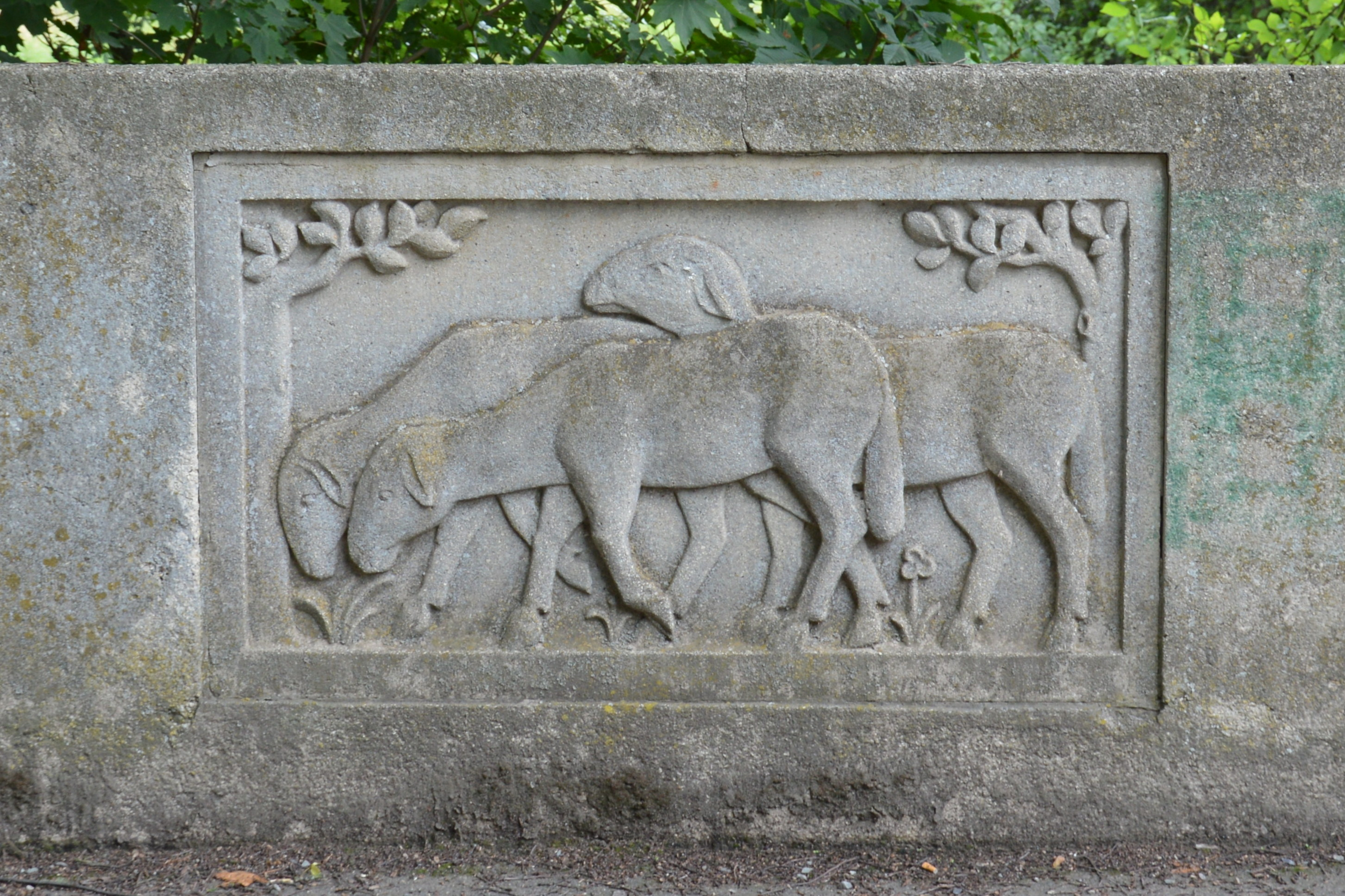 Schafe an der Schafbrücke